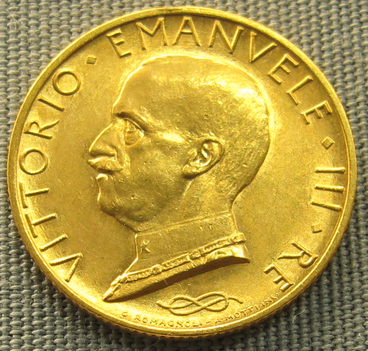 Italia, 100 lire di vittorio emanuele III, 1931